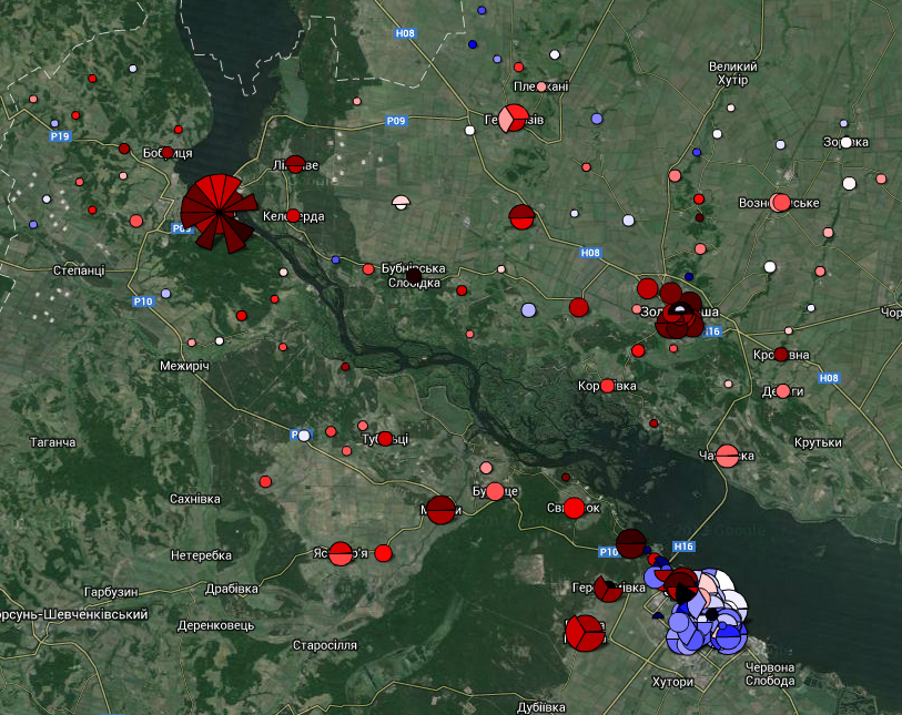 Результати повторних виборів народних депутатів 15 грудня 2013 р. на округах № 194 та 197